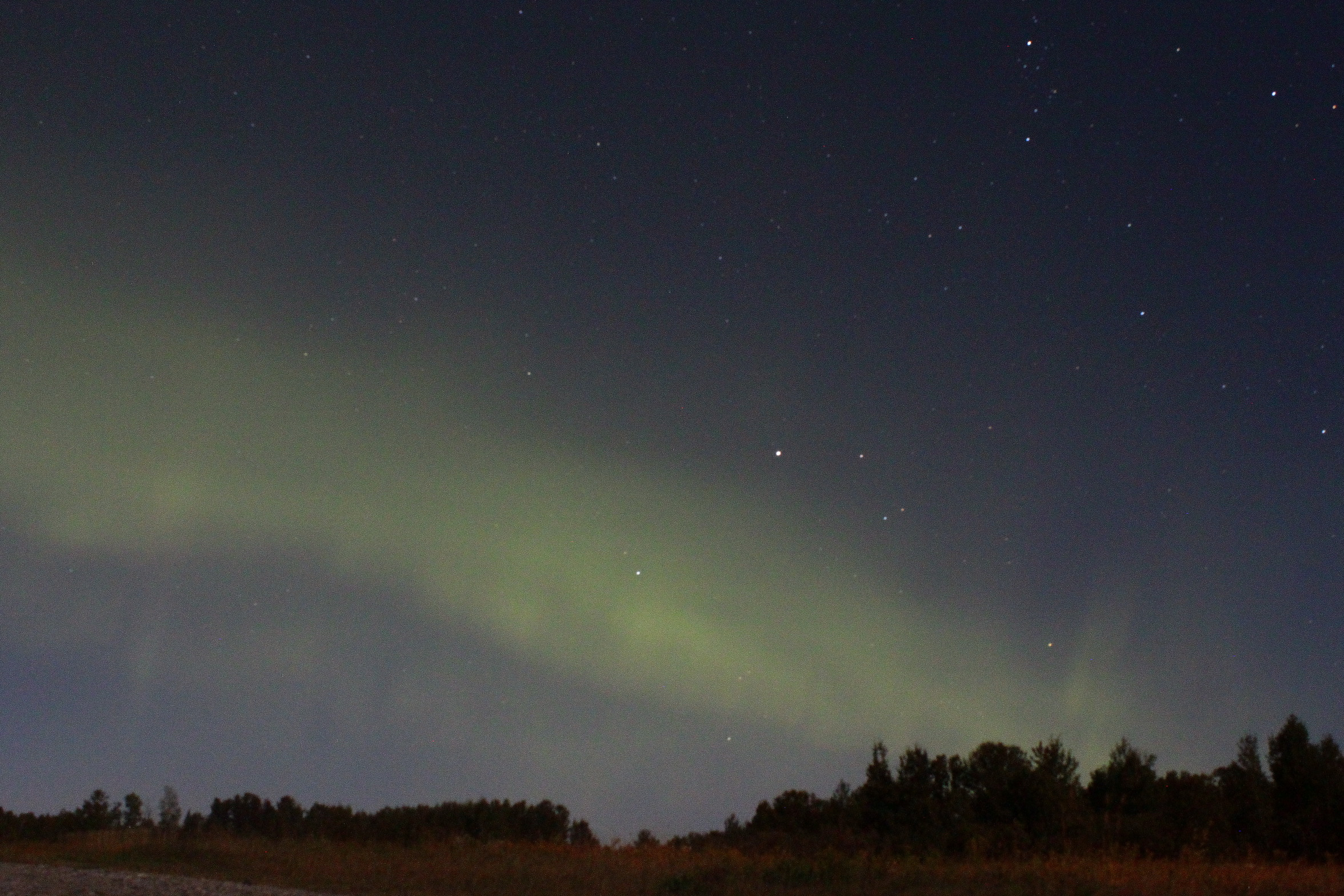 Aurore captée dans la région de l'Abitibi au Canada (48e parallèle Nord)